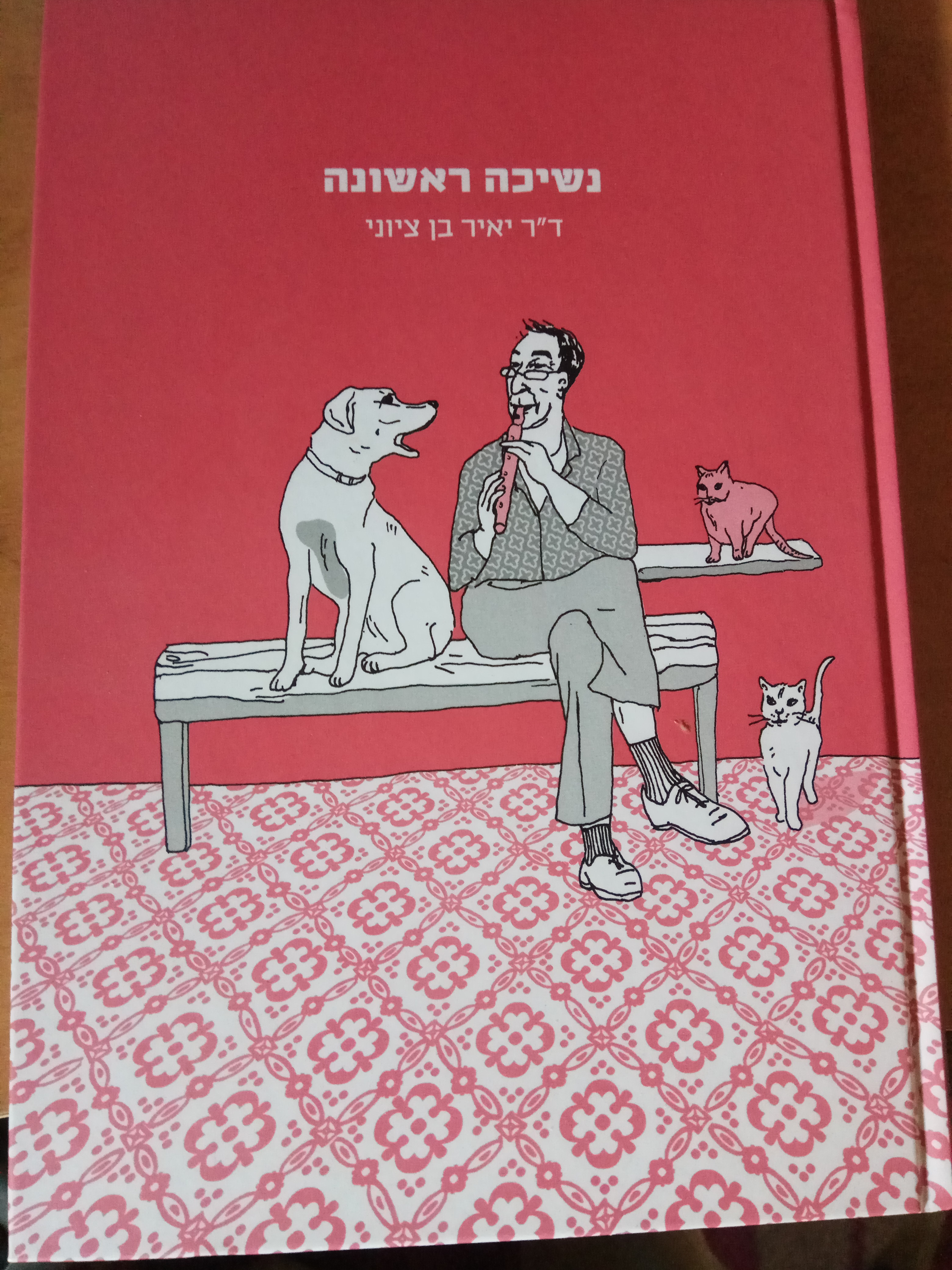 דר" יאיר בן ציוני בעטיפת ספרו נשיכה ראשונה.